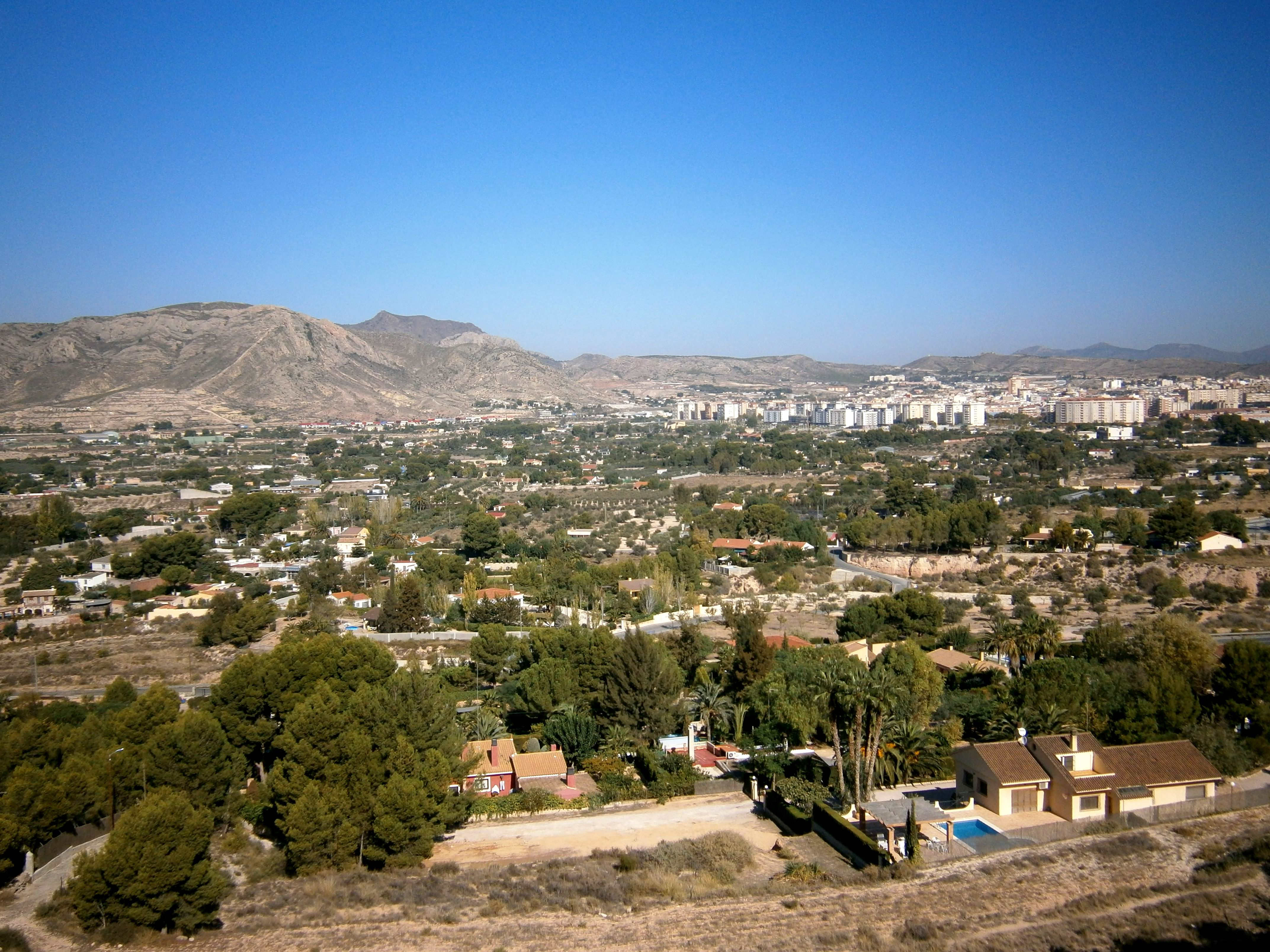 Campo de Elda